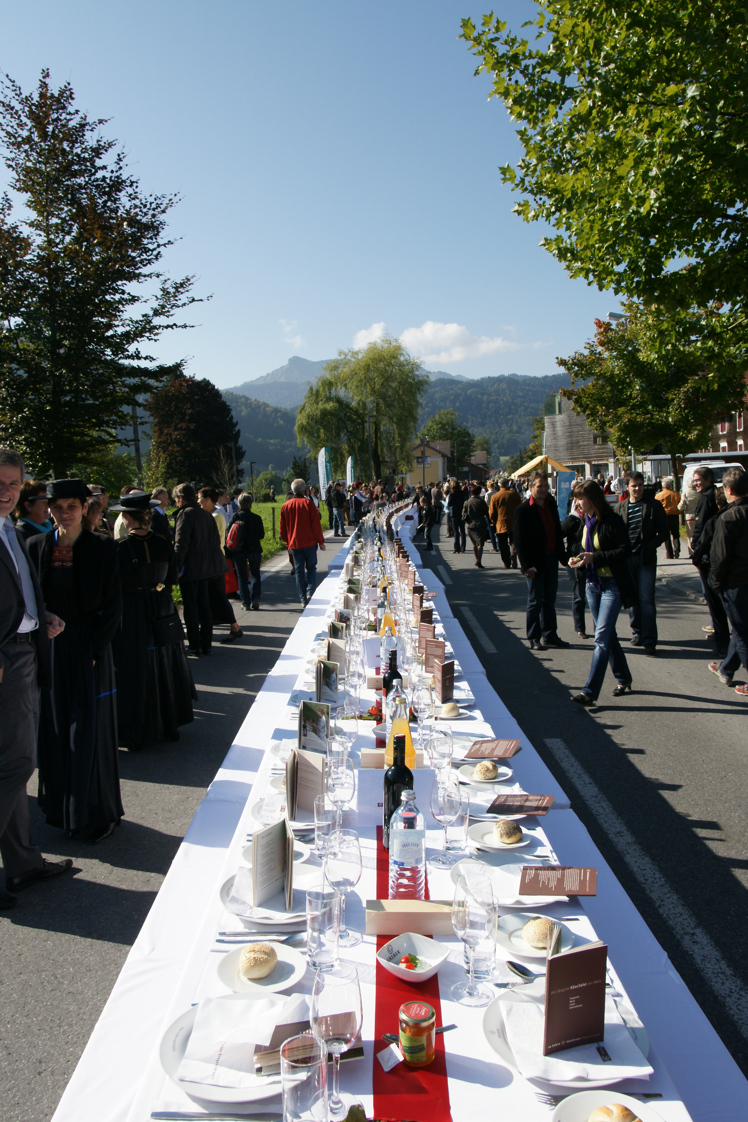 Die längste Käsetafel der Welt (im Guinness-Buch der Rekorde ca.500m) wurde am 27.09.2008 zum 10 jährigen Bestehen der Käsestraße Bregenzerwald in Andelsbuch für ca. 2000 Gäste eingedeckt.